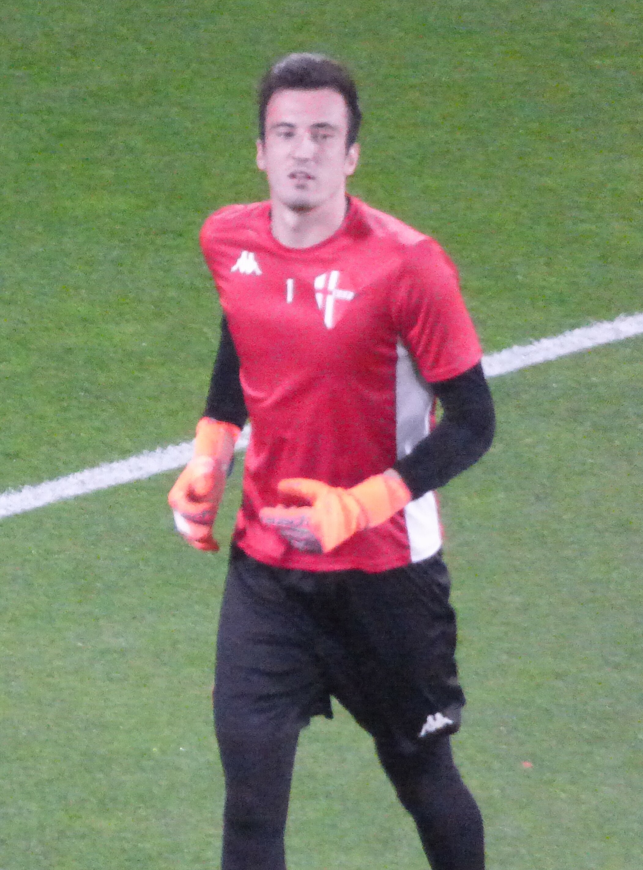 Samuele Perisan lors du match amical RC Lens - Calcio Padova, le 11 octobre 2018 au Stade Bollaert-Delelis de Lens.